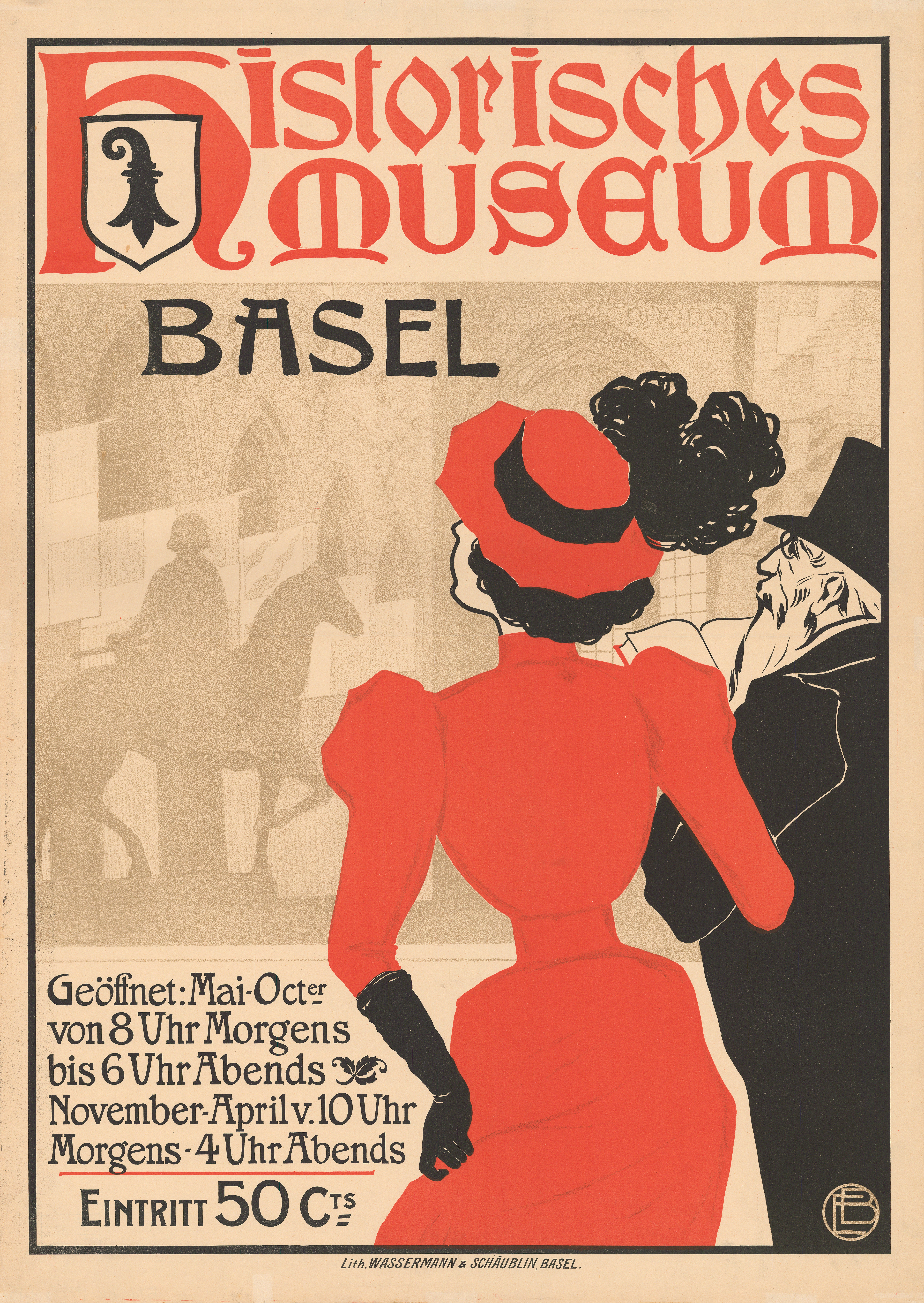 Plakat zur Eröffnung des Historischen Museums Basel im Jahr 1894. Entwurf von Emil Beurmann, Lithographie von Wassermann und Schäublin.